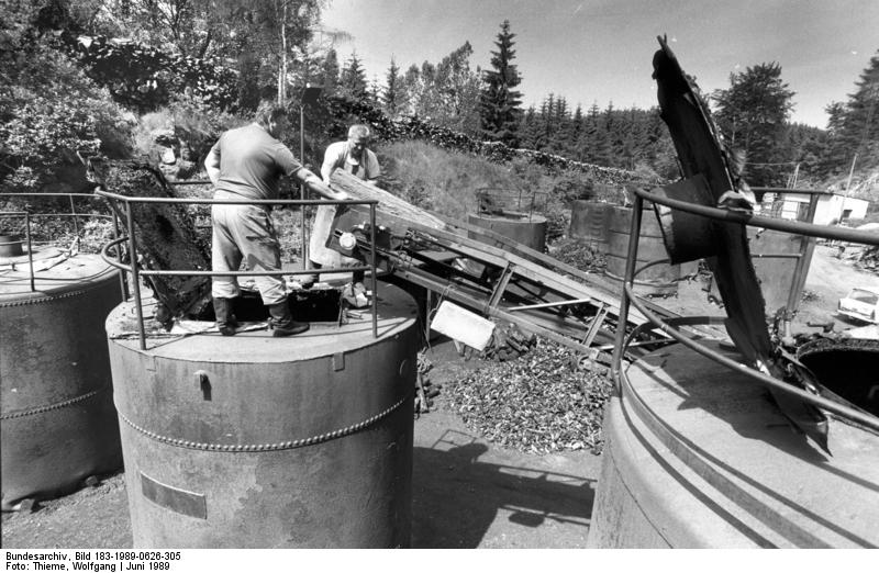 Sosa, Köhlerei ADN-ZB/Thieme 26.6.1989 Maschinen und Transportmittel erleichtern den Köhlern in Sosa, Bez. Karl-Marx-Stadt, heute wesentlich die Arbeit. Hier wird eine der vier Meter hohen Retorten von Gerhard Unger (l.) und Lothar Teubner von oben beschickt. Fünf bis zehn Festmeter Holz schluckt ein solcher Ofen.